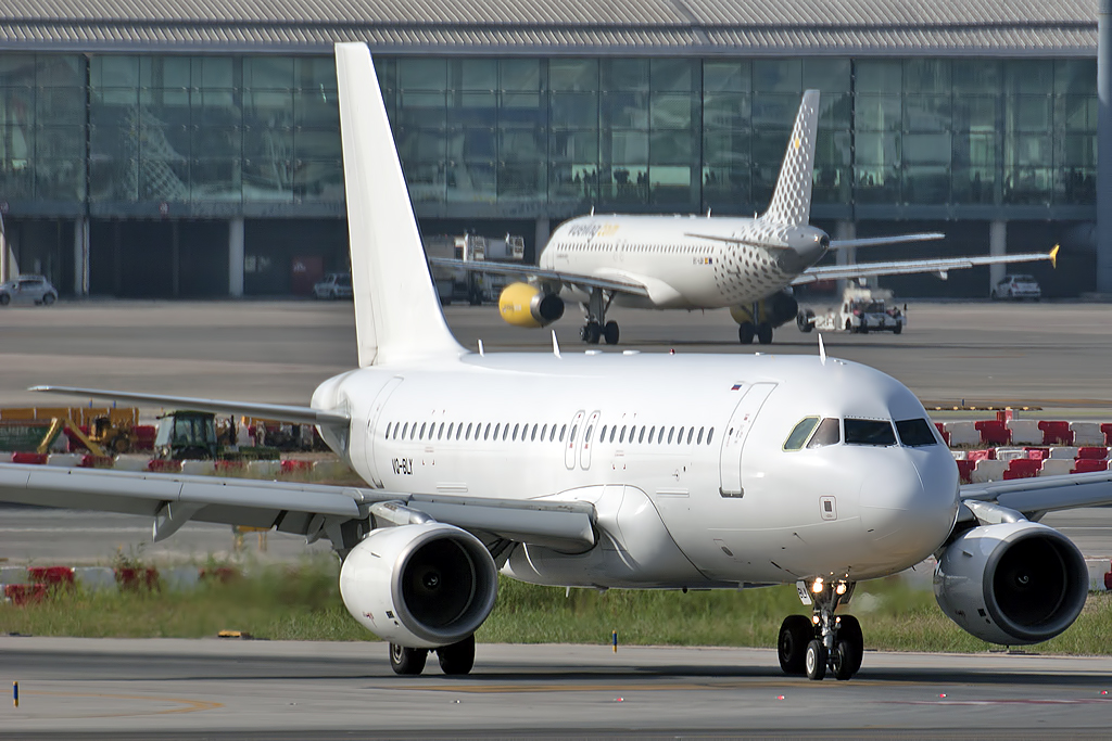 Barcelona El Prat (LEBL/BCN) Airport